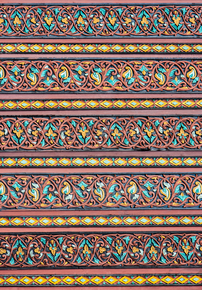 Ukiran Minang sejajar